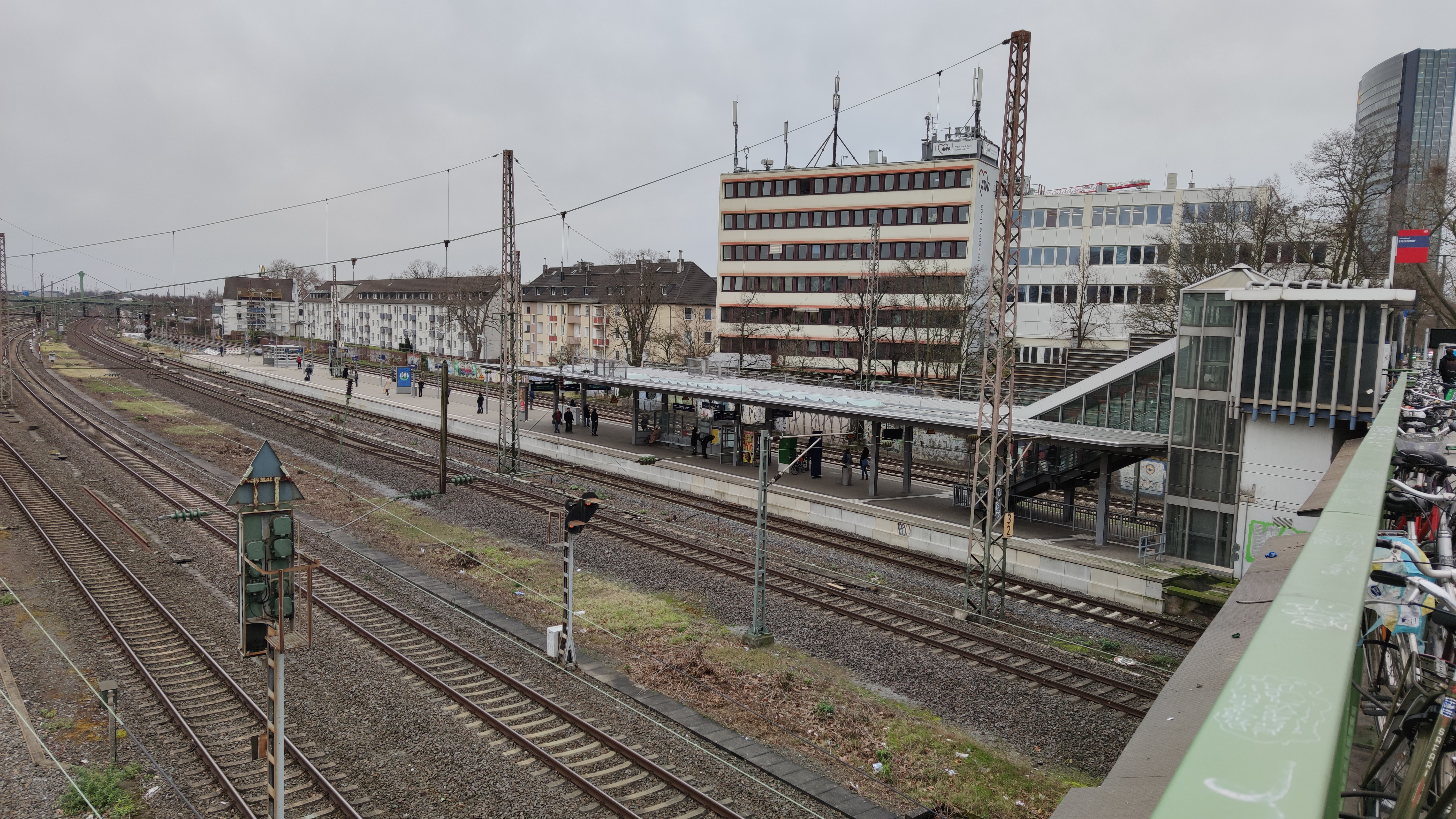 Der S-Bahn Haltepunkt Düsseldorf Derendorf im Jahr 2020